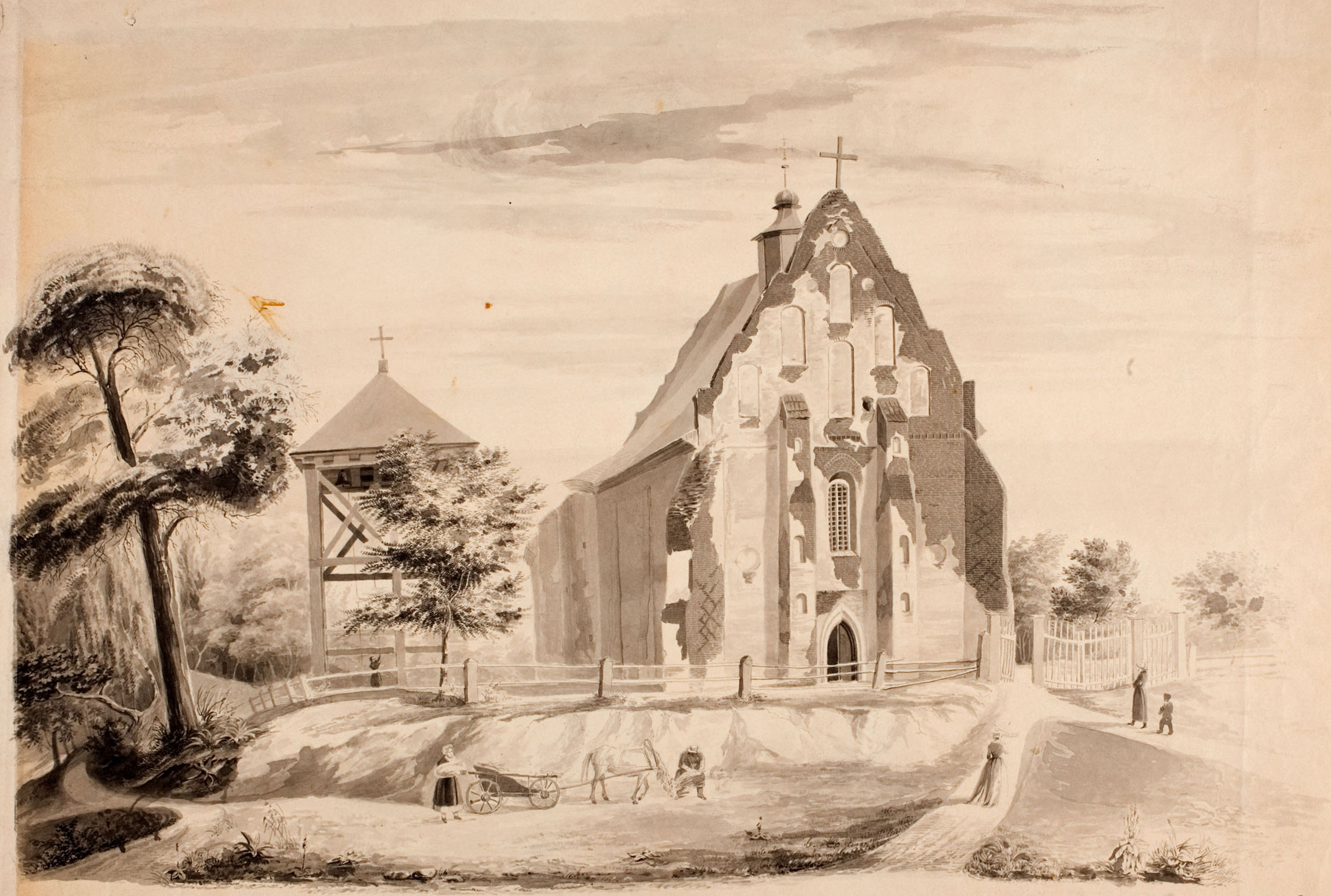 Беларуская (тарашкевіца): Ішкальдзь (Iškaldź). Касьцёл Найсьвяцейшай Тройцы